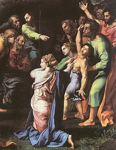 detail